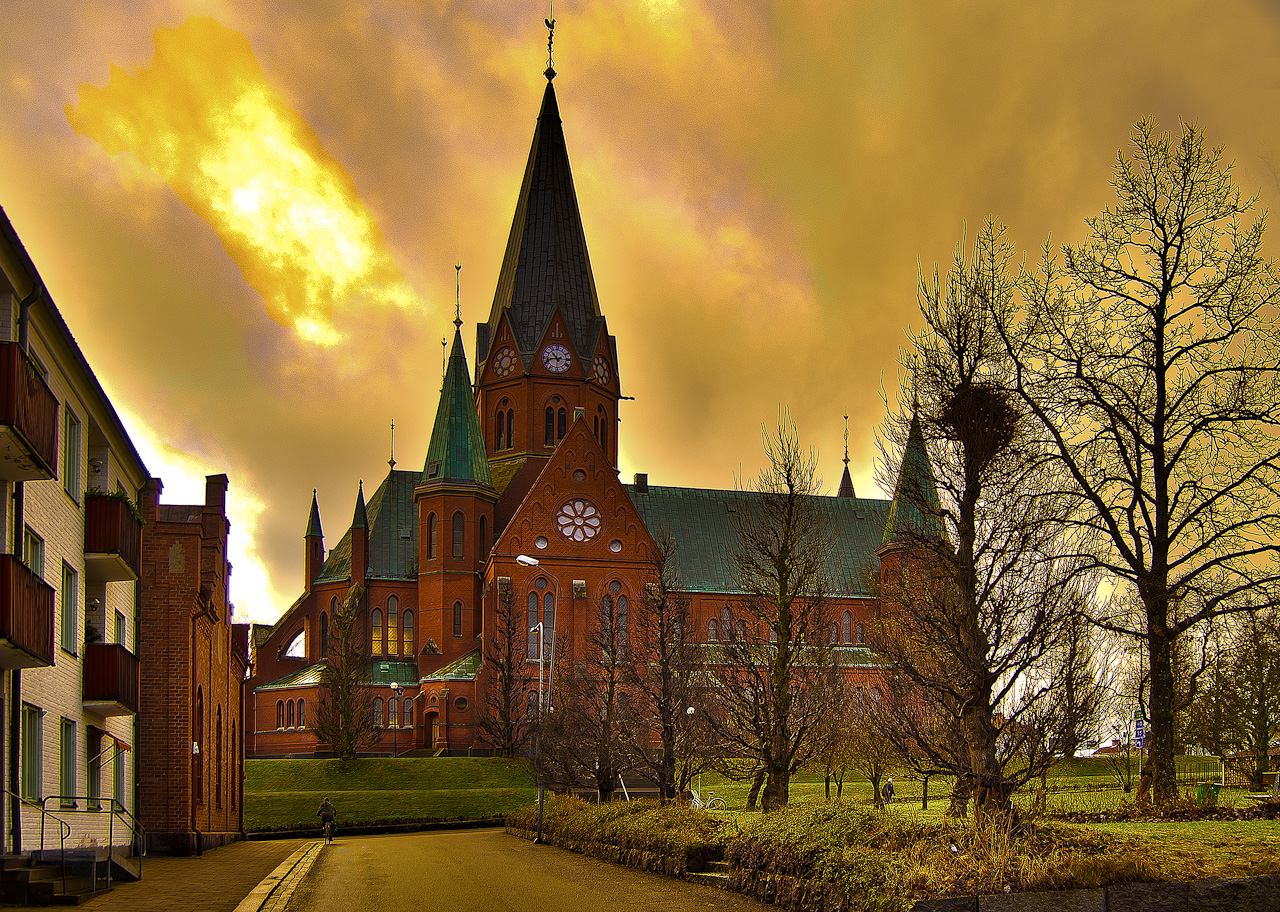 St:Petri kyrka fotograferad från nordsidan. Fotot är en hopslagning av 4 bilder till en HDR bild.